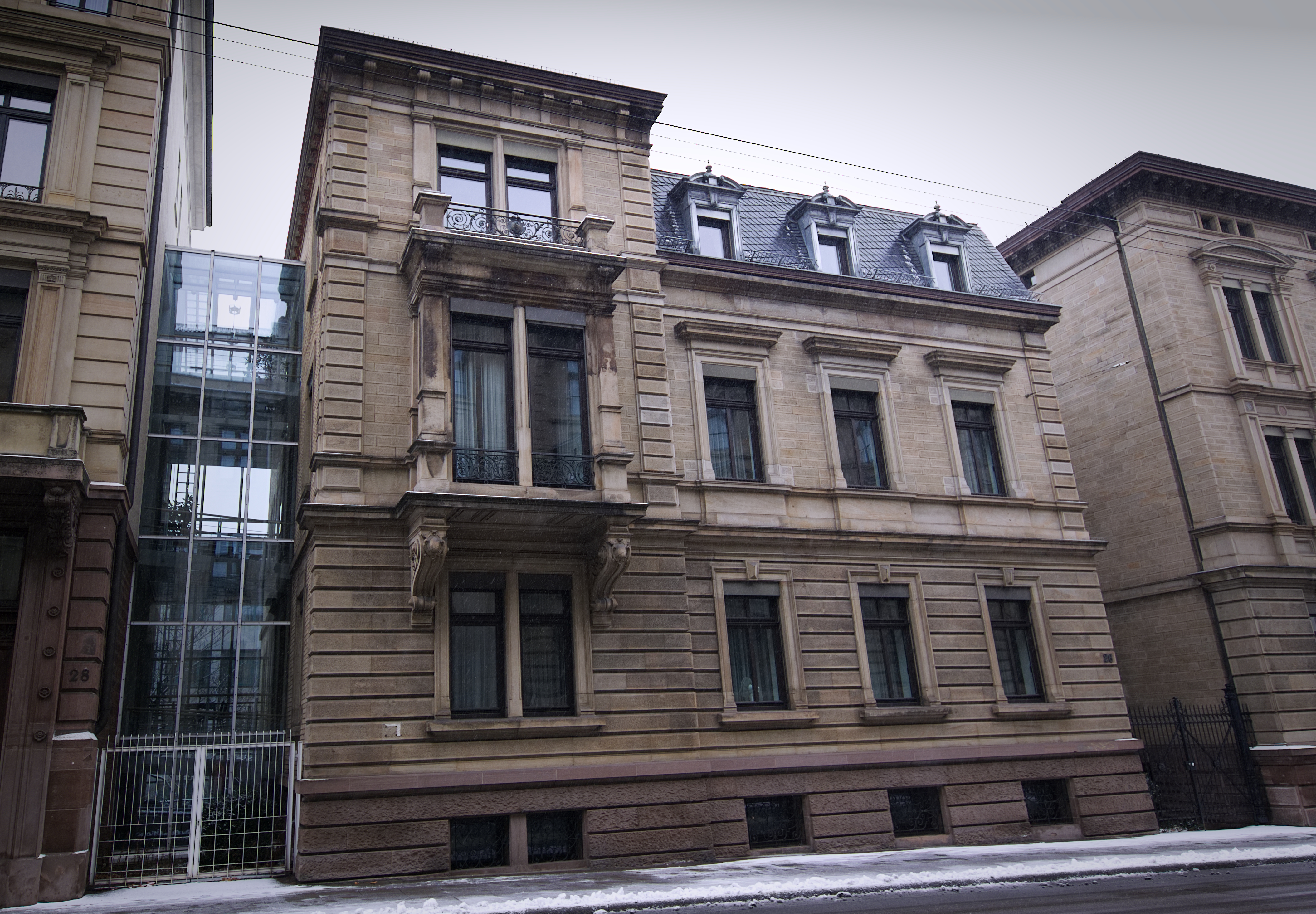 Ehemalige Villa Schnabel in der Reinsburgstraße 26, Stuttgart. Erbaut 1887 von Wittmann und Stahl im Neorenaissance-Stil. Geschützt nach § 2 DSchG.